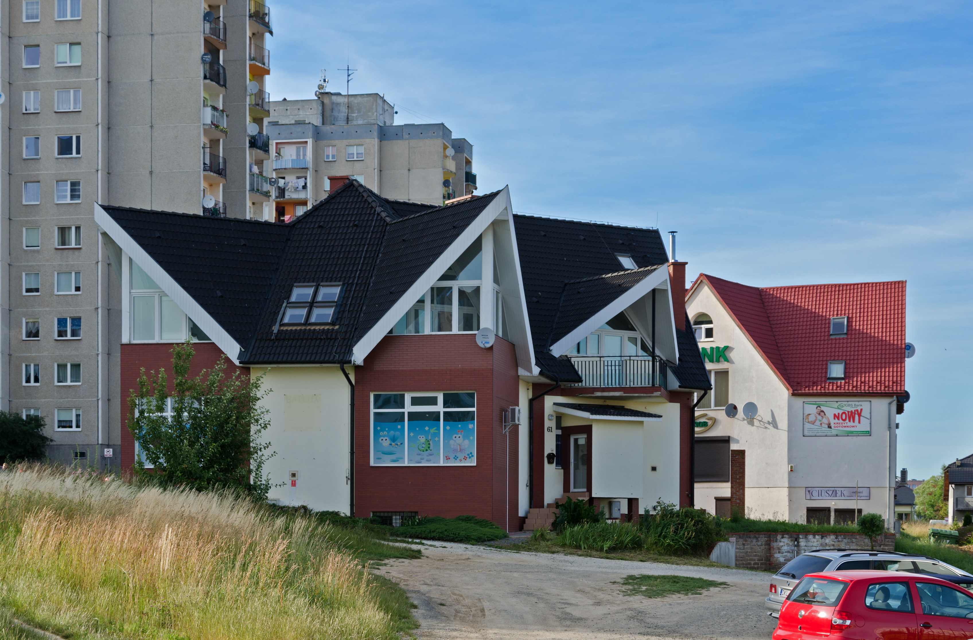 Kłodzko, ul. Przyjaciół dzieci